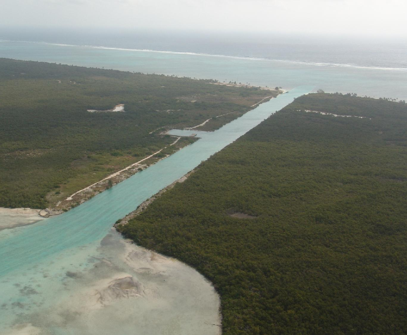 Imagen aerea del canal de zaragoza en la bahia de chetumal